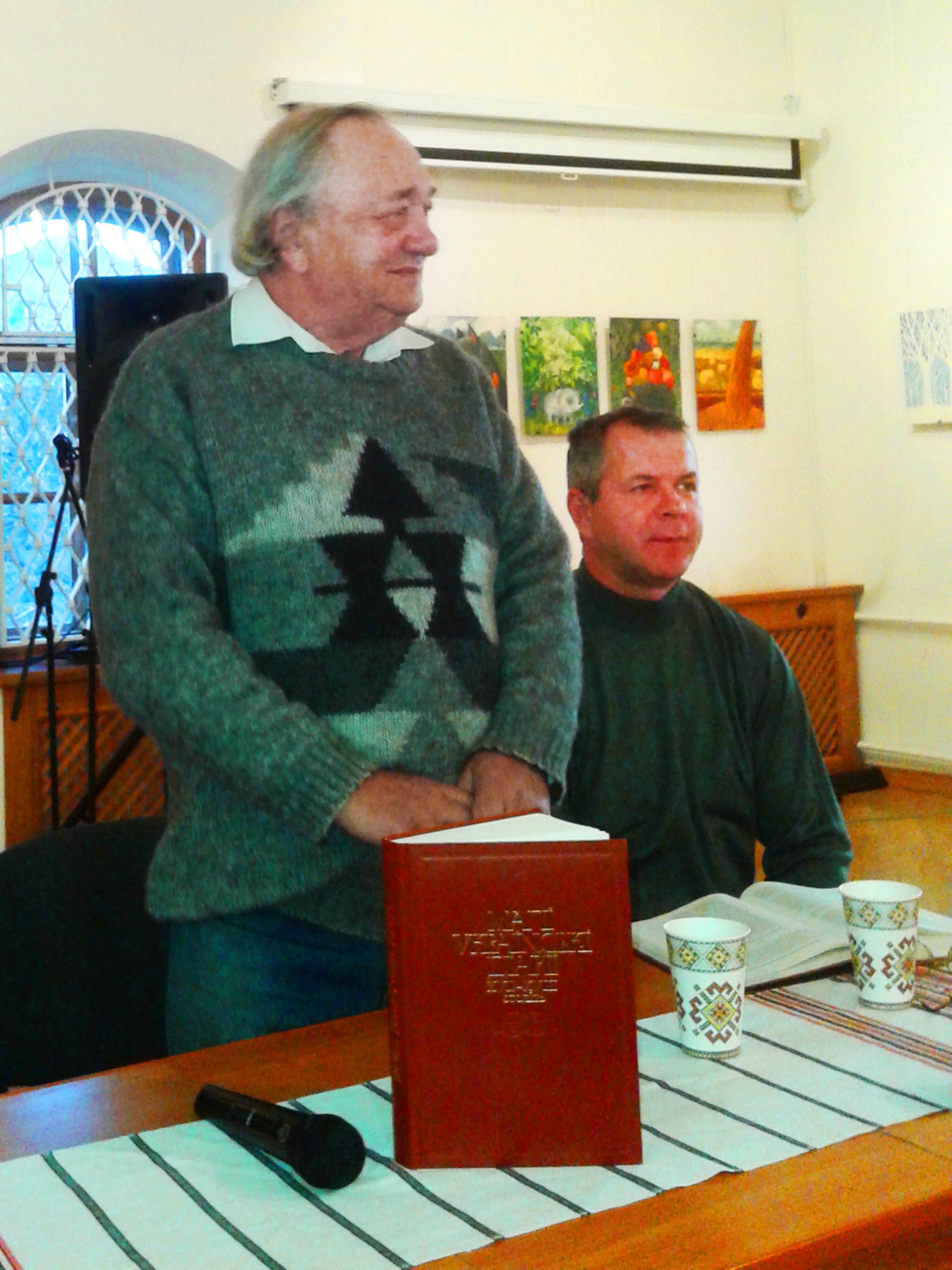 Валерій Шевчук на презентації книги "Малі українські діарії XVII-XVIII ст." (Музей книги, Київ)